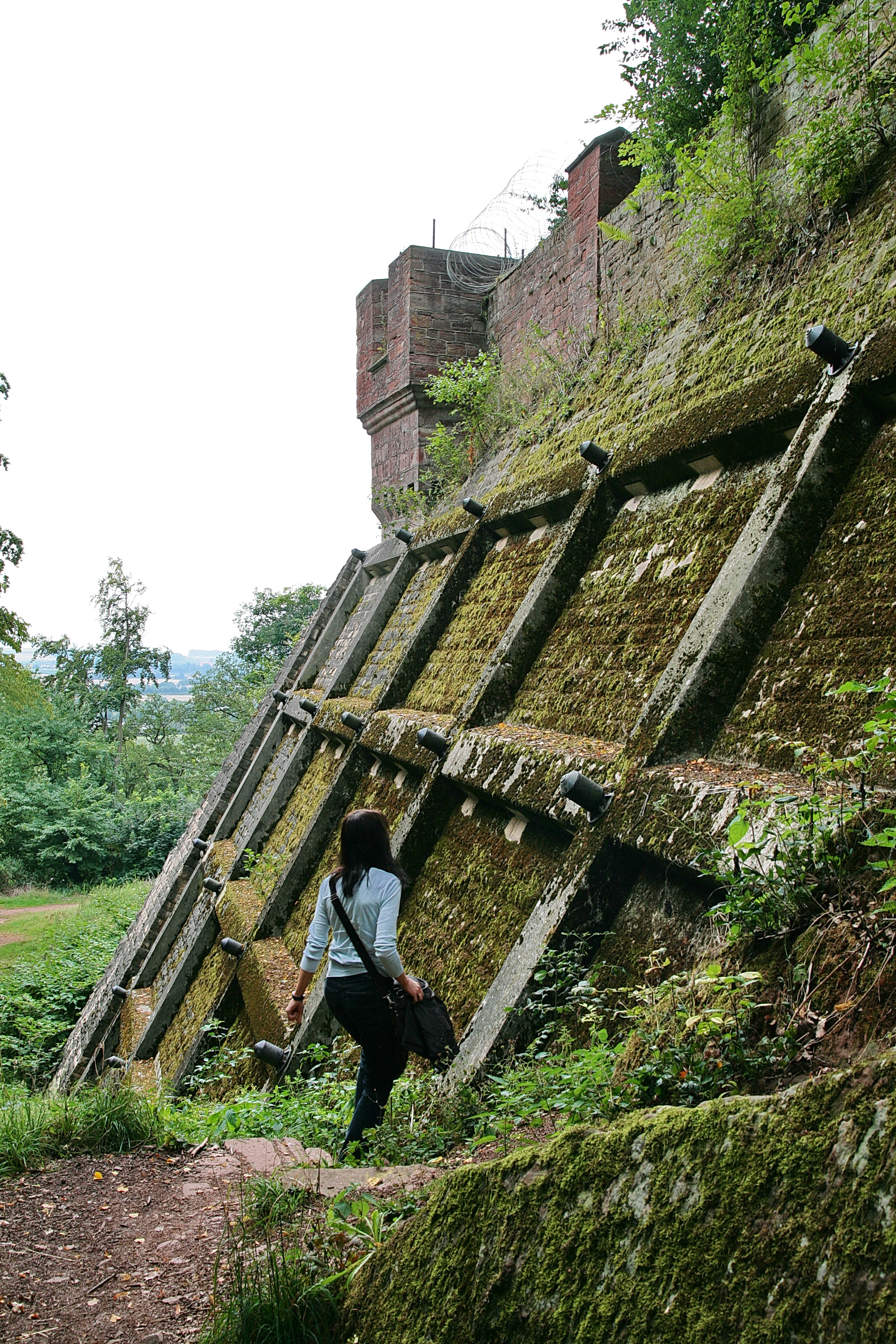 In Deutschland, Niedersachsen, Nordstemmen: Das Schloss Marienburg wurde in den Jahren 1857 bis 1867 von König Georg V. von Hannover als Geschenk für Königin Marie zu ihrem 39. Geburtstag in eine frühere Ringwallanlage mit dem Namen Schulenburg hineingebaut.